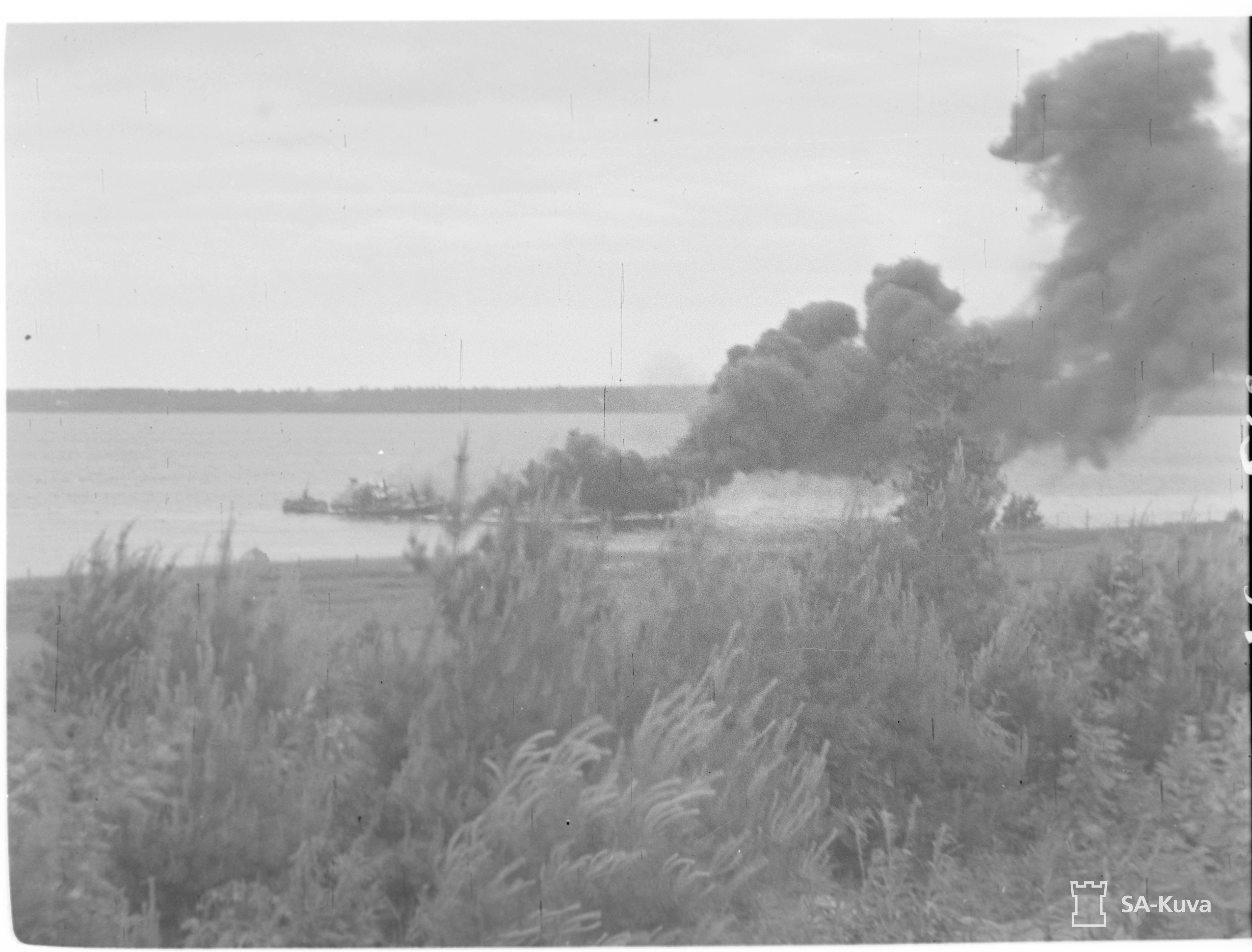 VMV 17 palavana